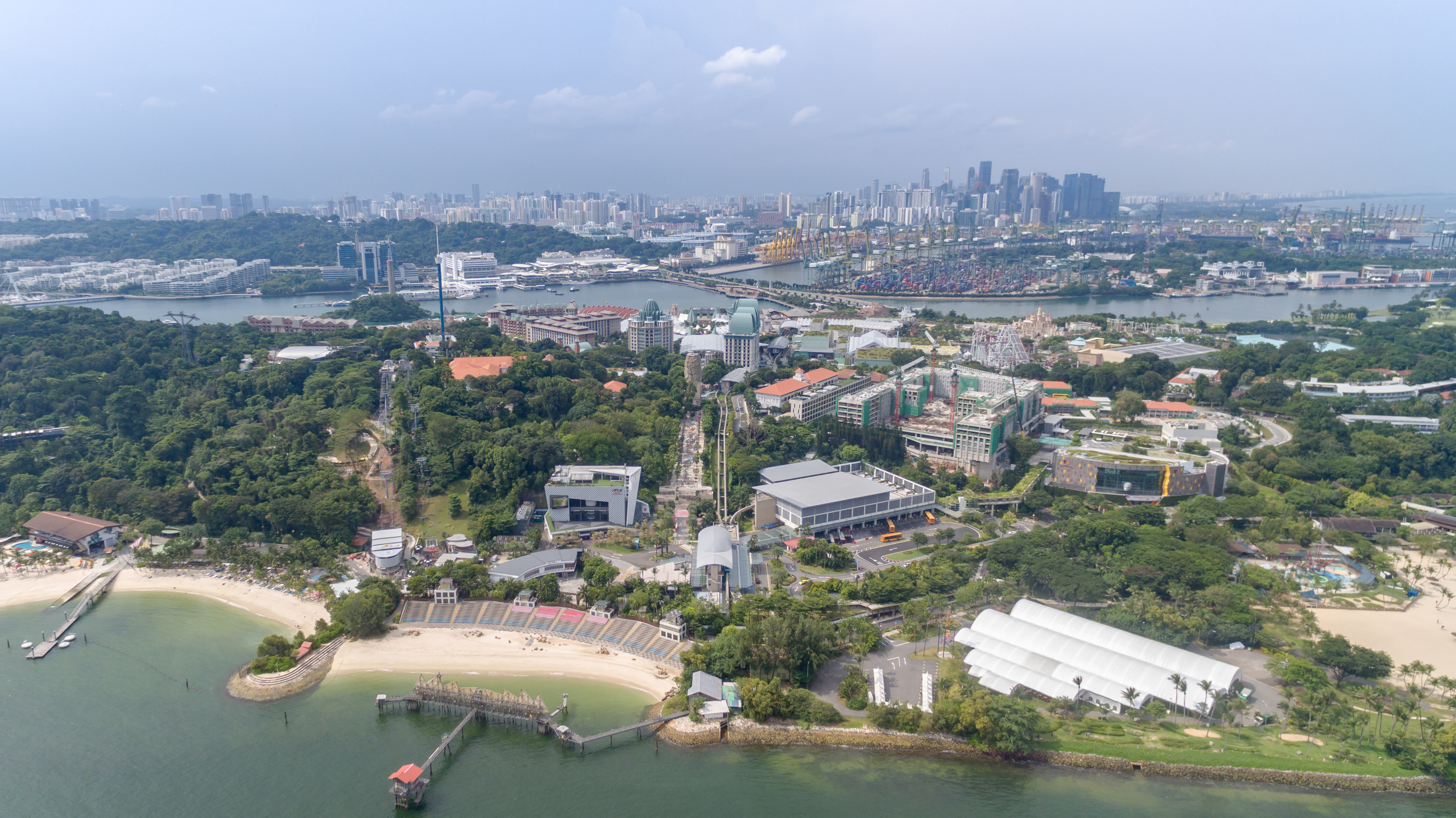 Sentosa Insel Singapur Singapur Singapore Luftbild aerial